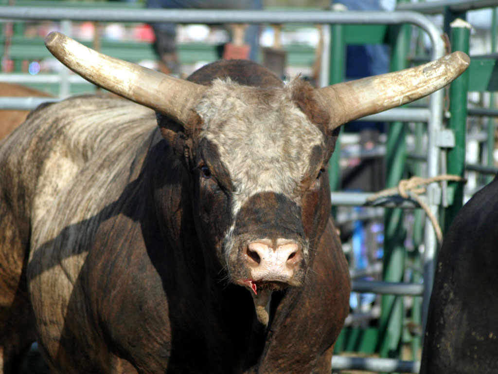 על פי מדרש תנחומא משיח בן יוסף נמשל לשור לעומת משיח בן דוד שנמשל לחמור. שור.